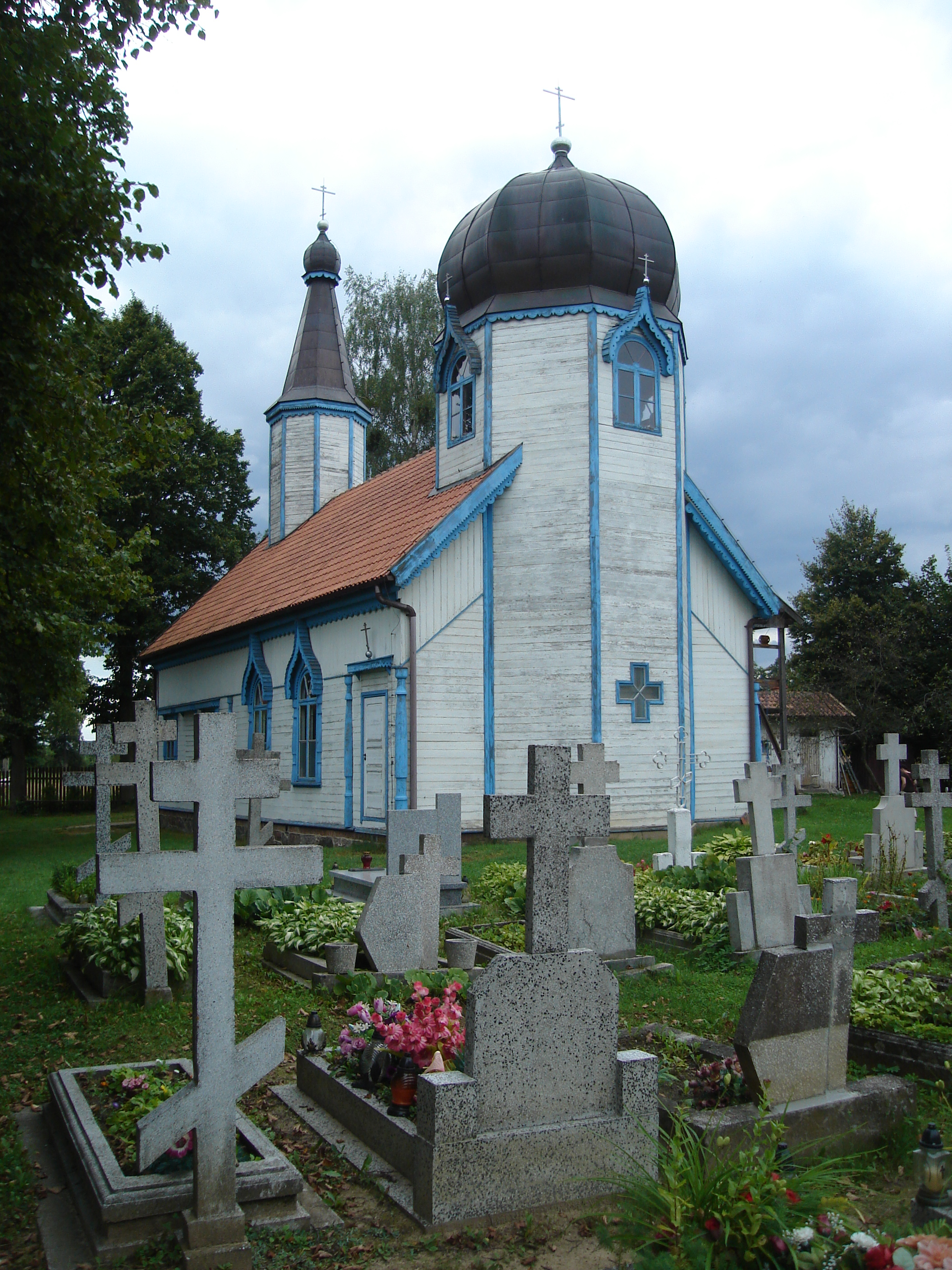 Cerkiew w Wojnowie